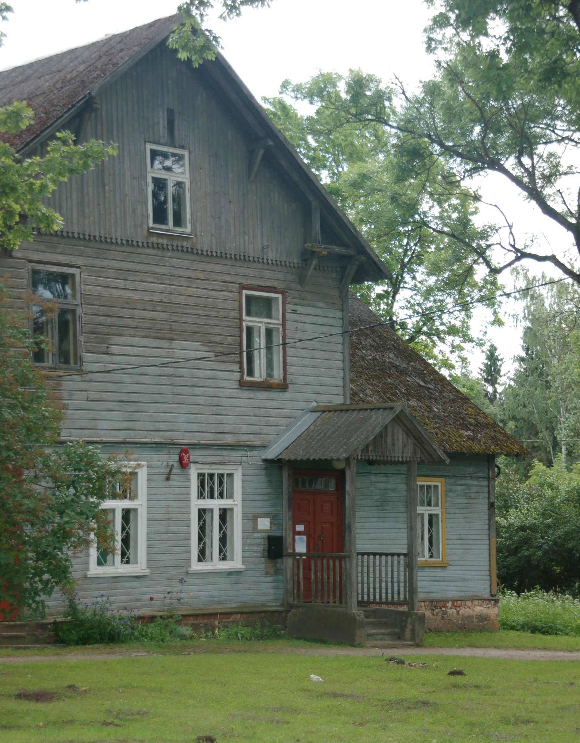 Nõgiaru raamatukogu